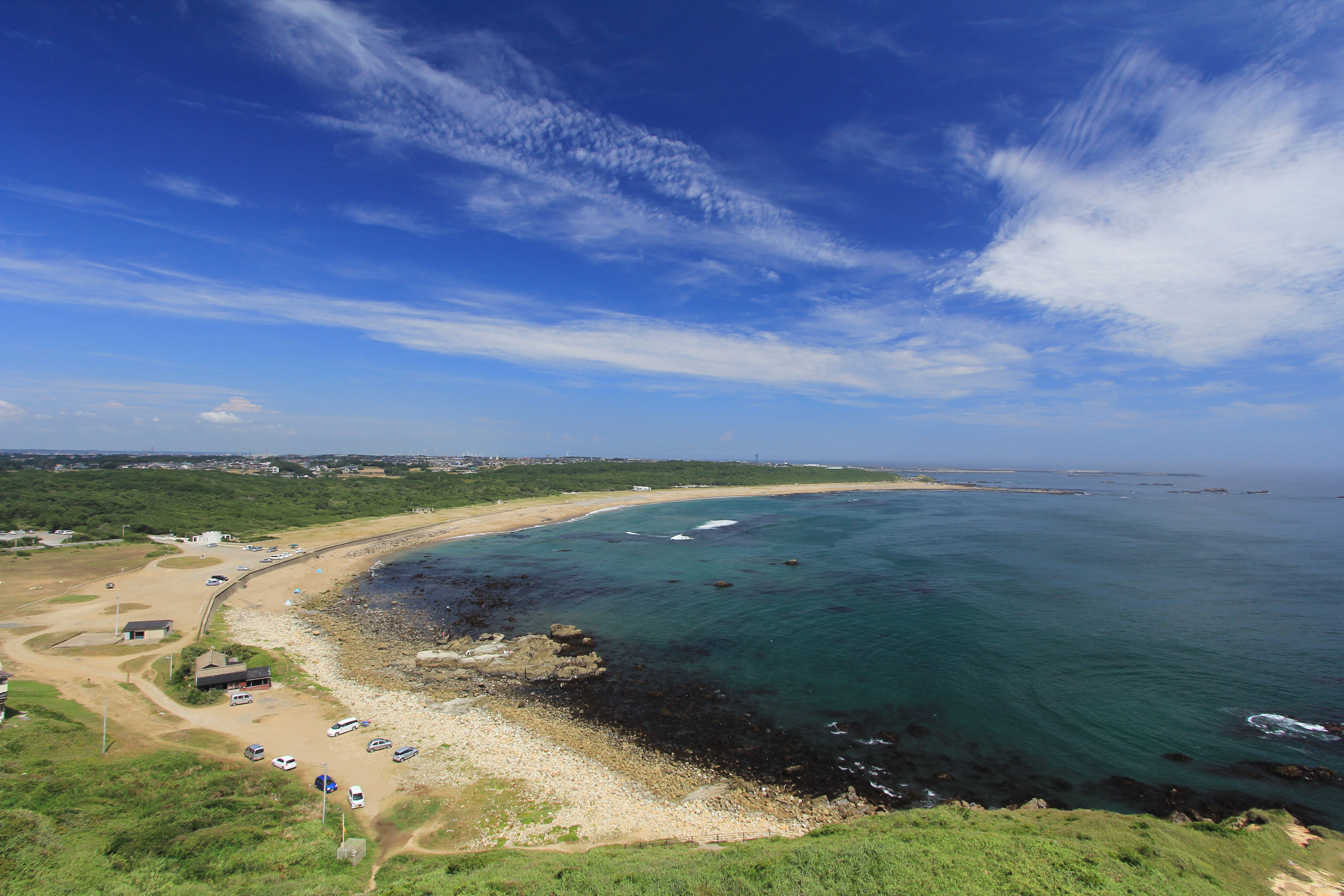 犬吠埼灯台からの風景